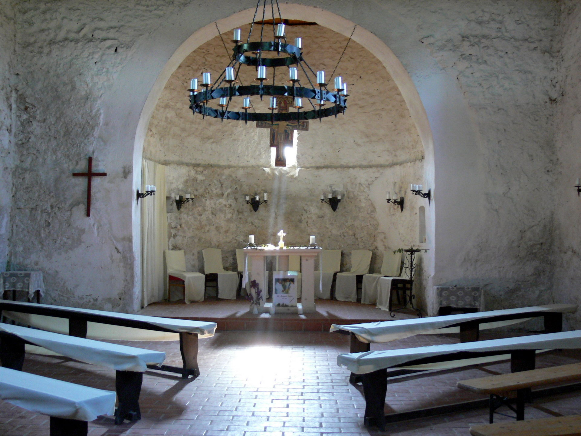 Gercse középkori temploma belülről